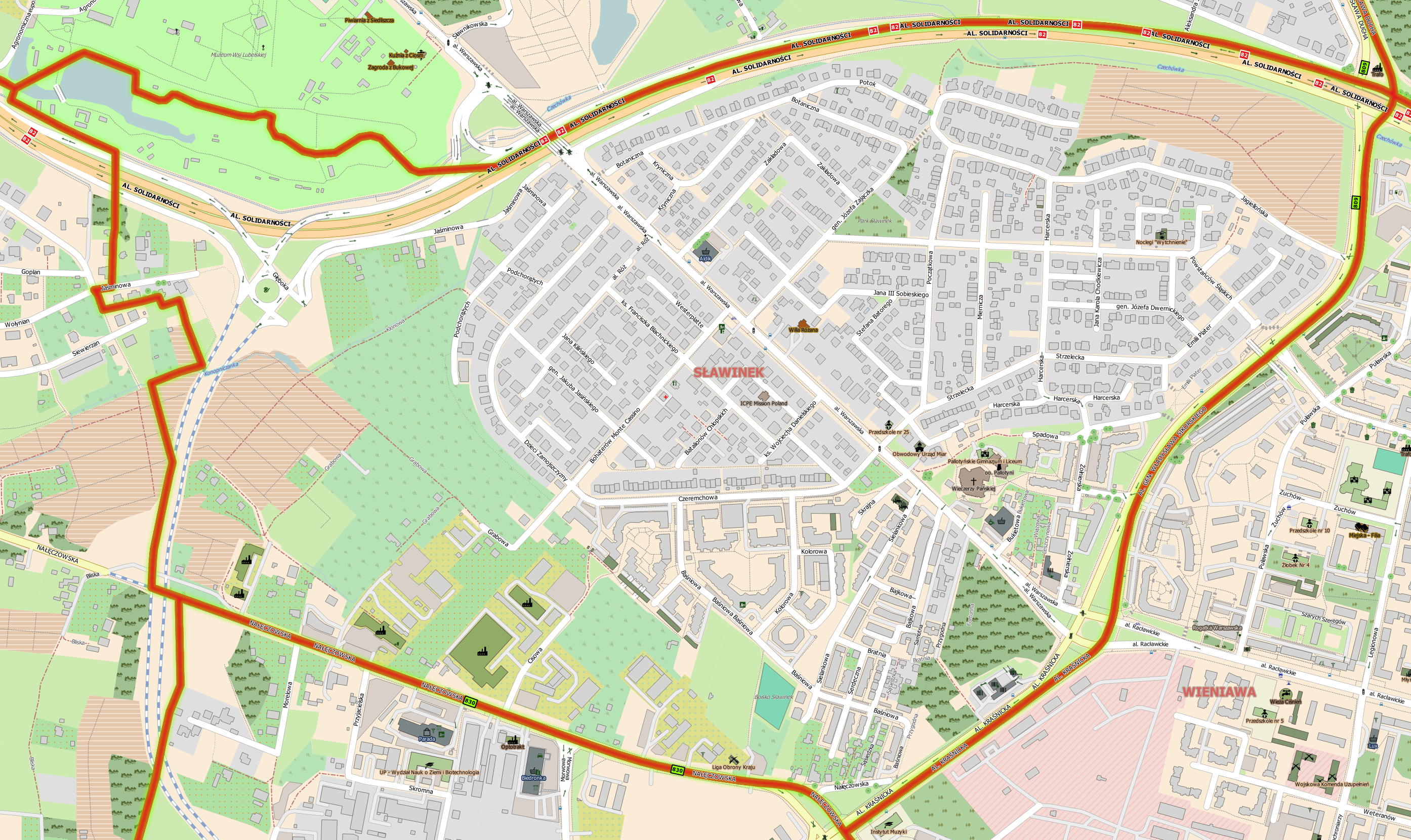 Plan dzielnicy Sławinek w Lublinie.